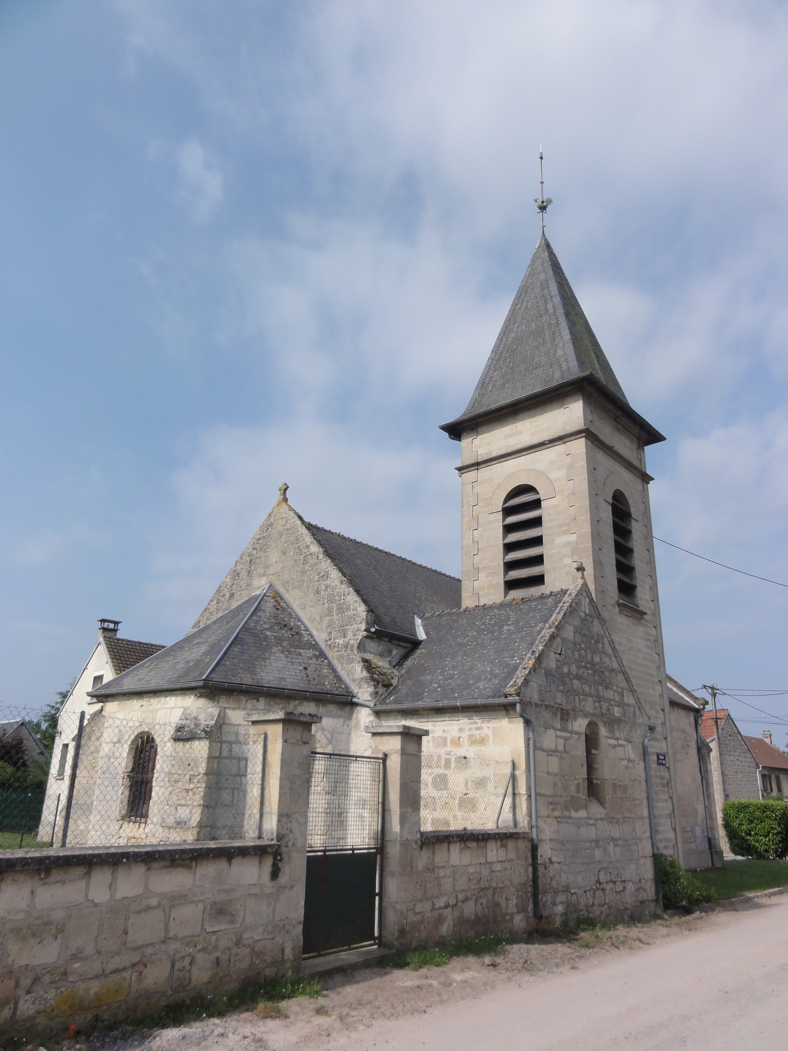 Osly-Courtil (Aisne) Église